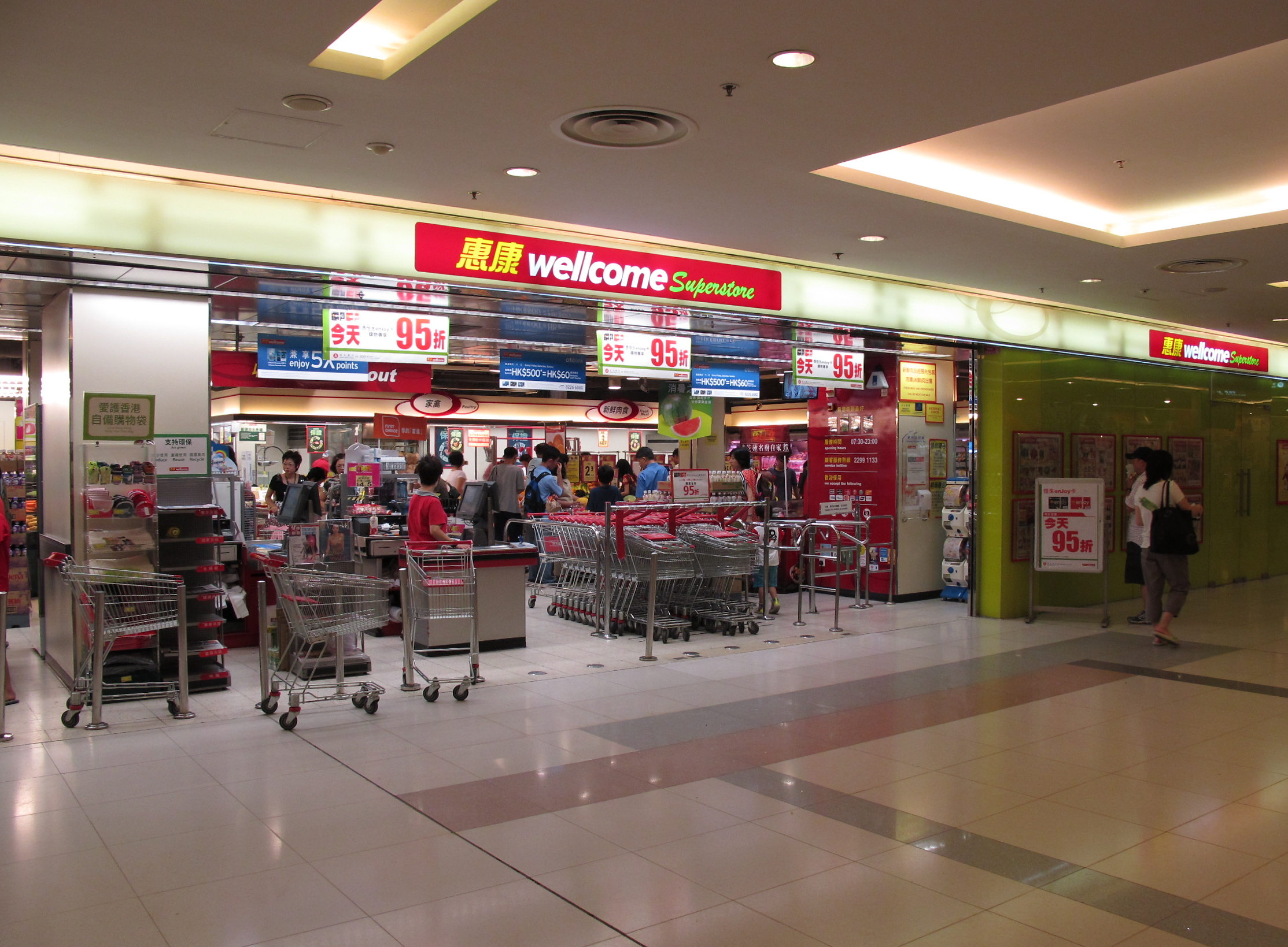 Wellcome Superstore in Liberte, Lai Chi Kok